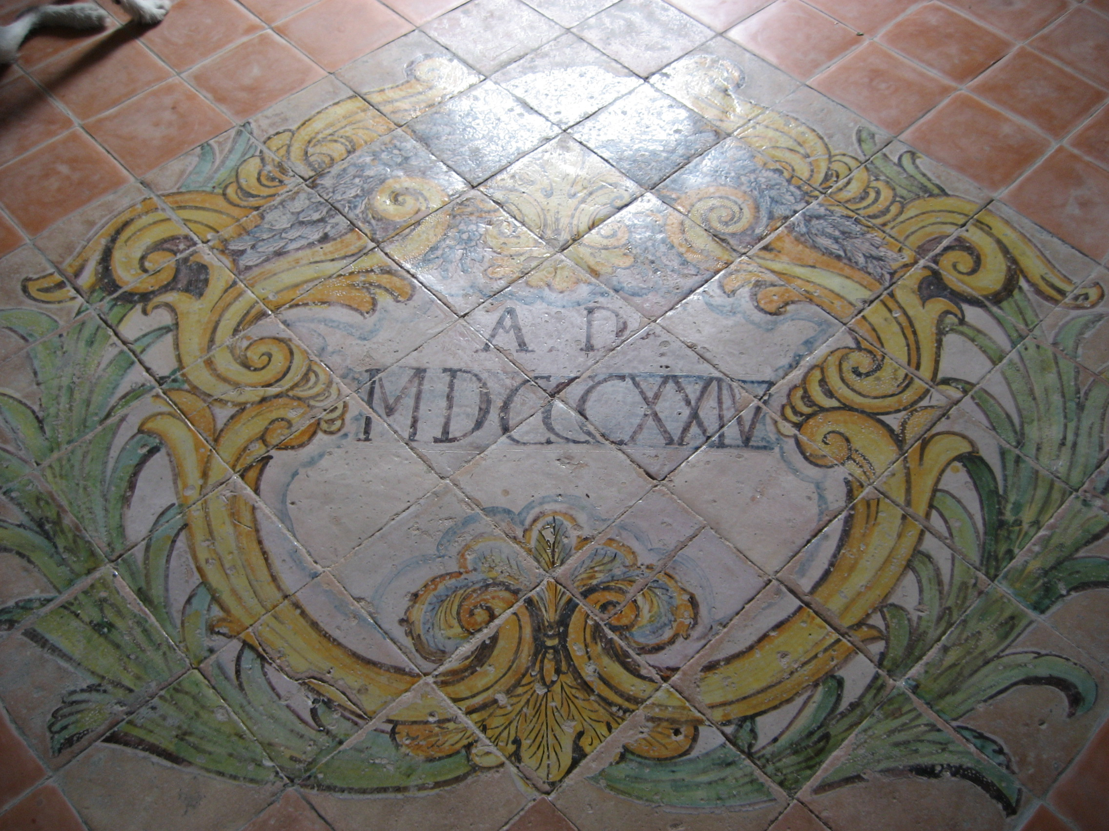 Chiesa di San Michele Arcangelo (Conca dei Marini): Parte centrale del pavimento della sacrestia.